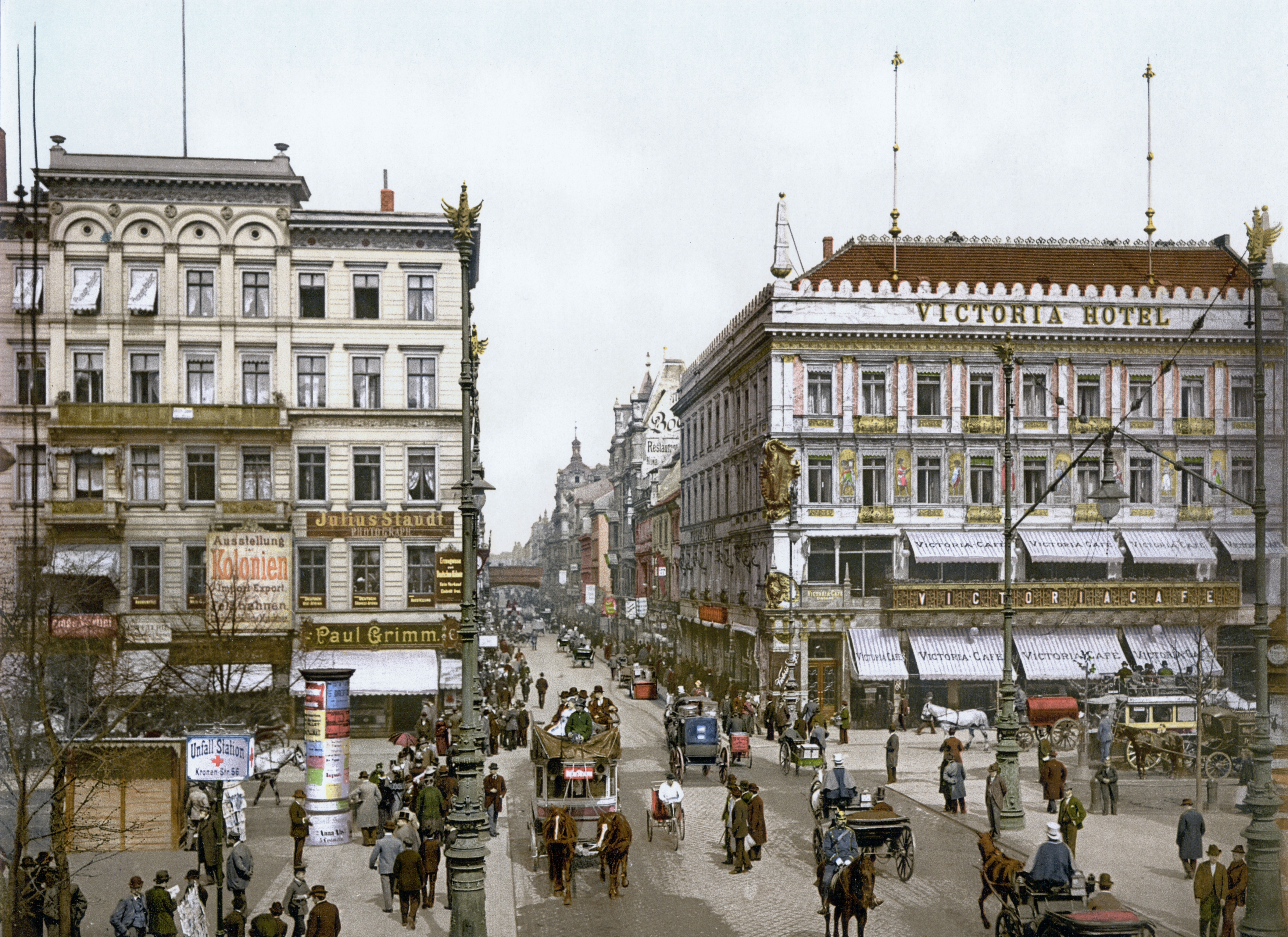 Berlin, Unter den Linden, Victoria Hotel zwischen 1890 und 1900